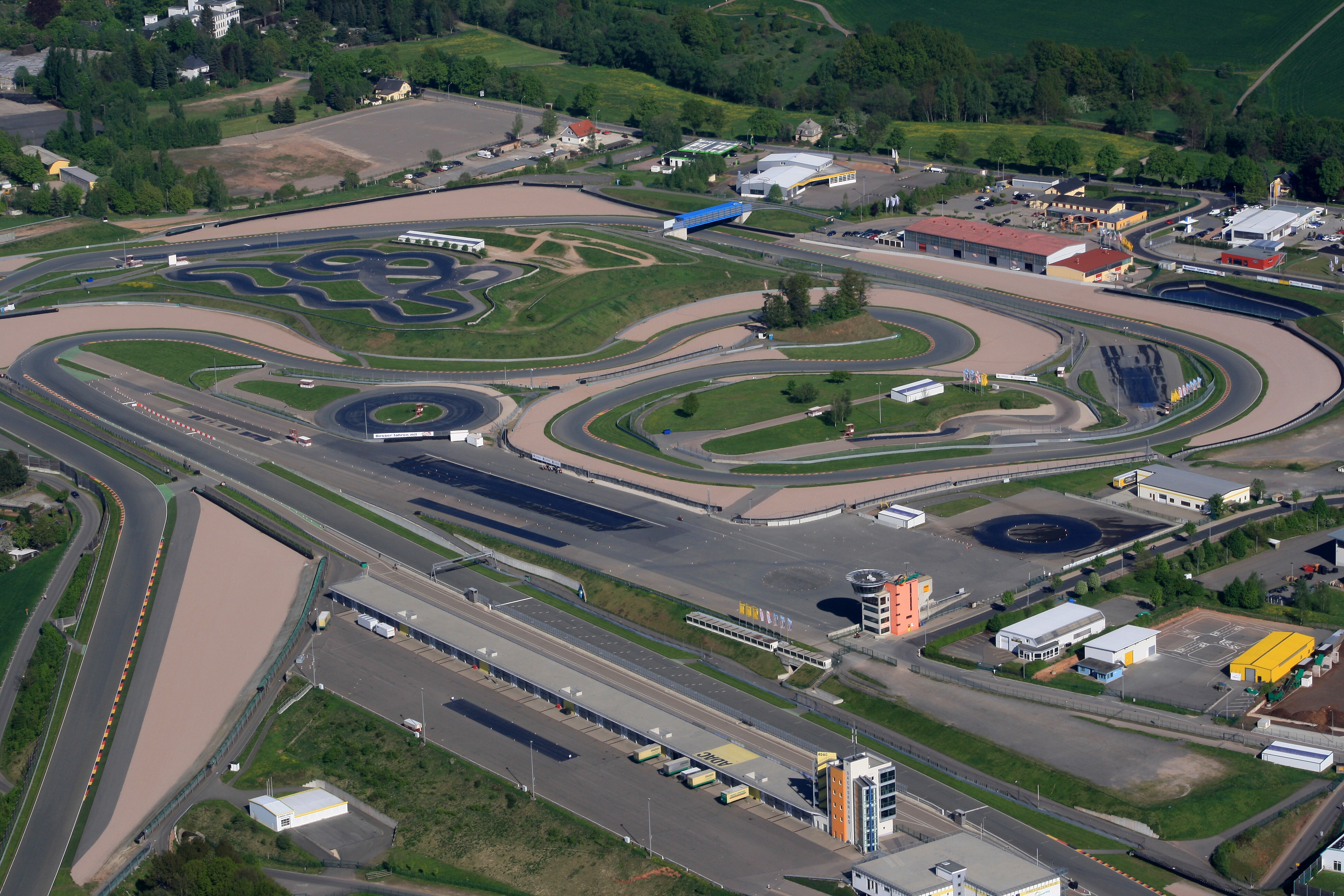 Hohenstein-Ernstal. Aufgenommen aus dem Flugzeug.